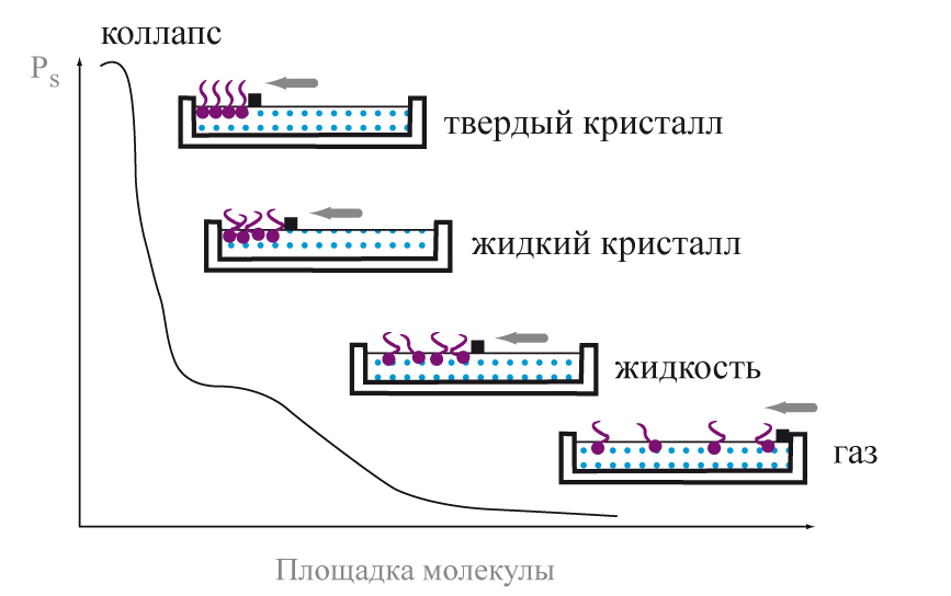 Состояние плёнки Ленгмюра–Блоджетт в зависимости от поверхностного давления.